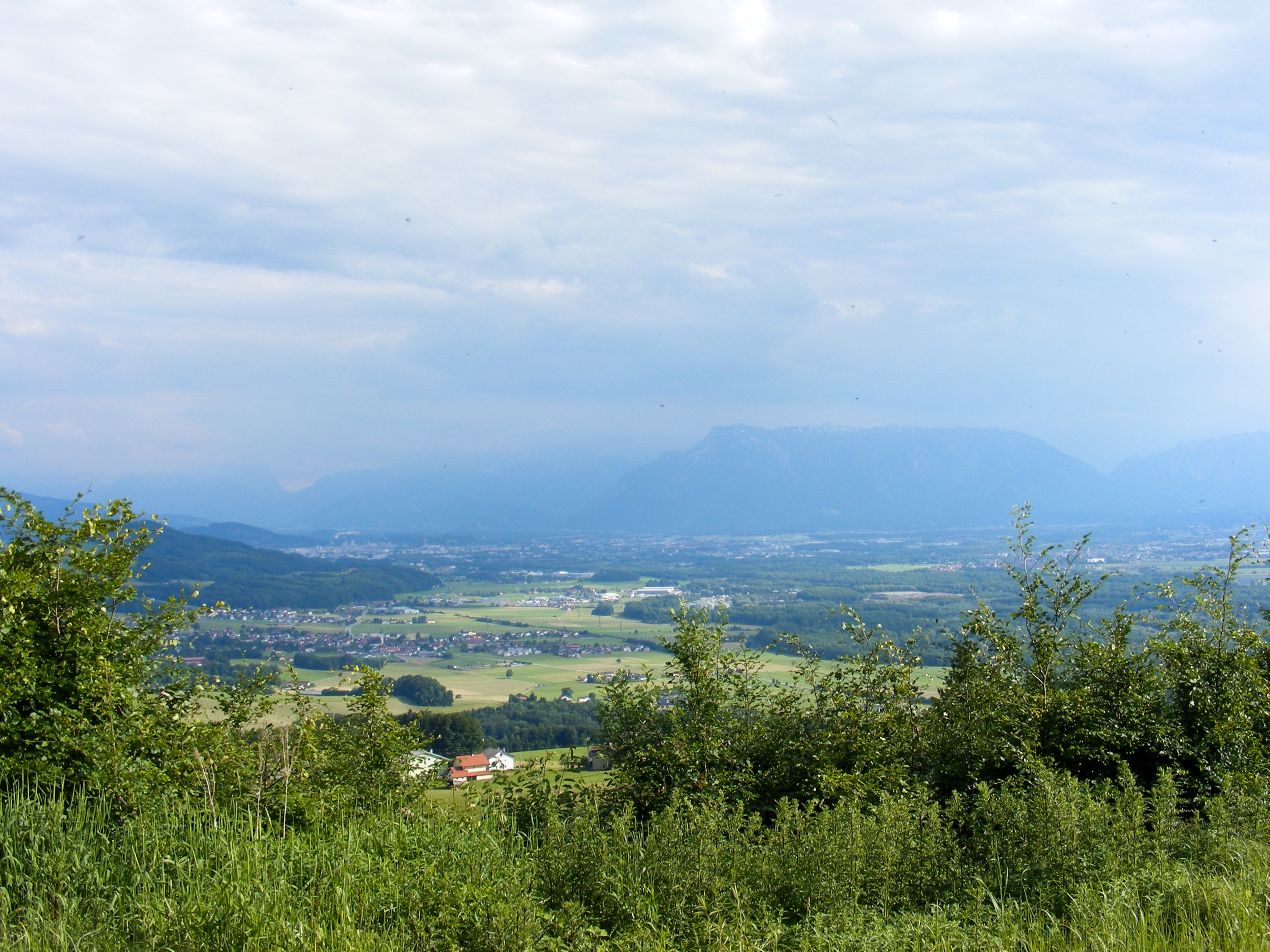 Blick vom Haunsberg Richtung Süden zur Stadt Salzburg; im Vordergrund das Gemeindegebiet von Anthering.